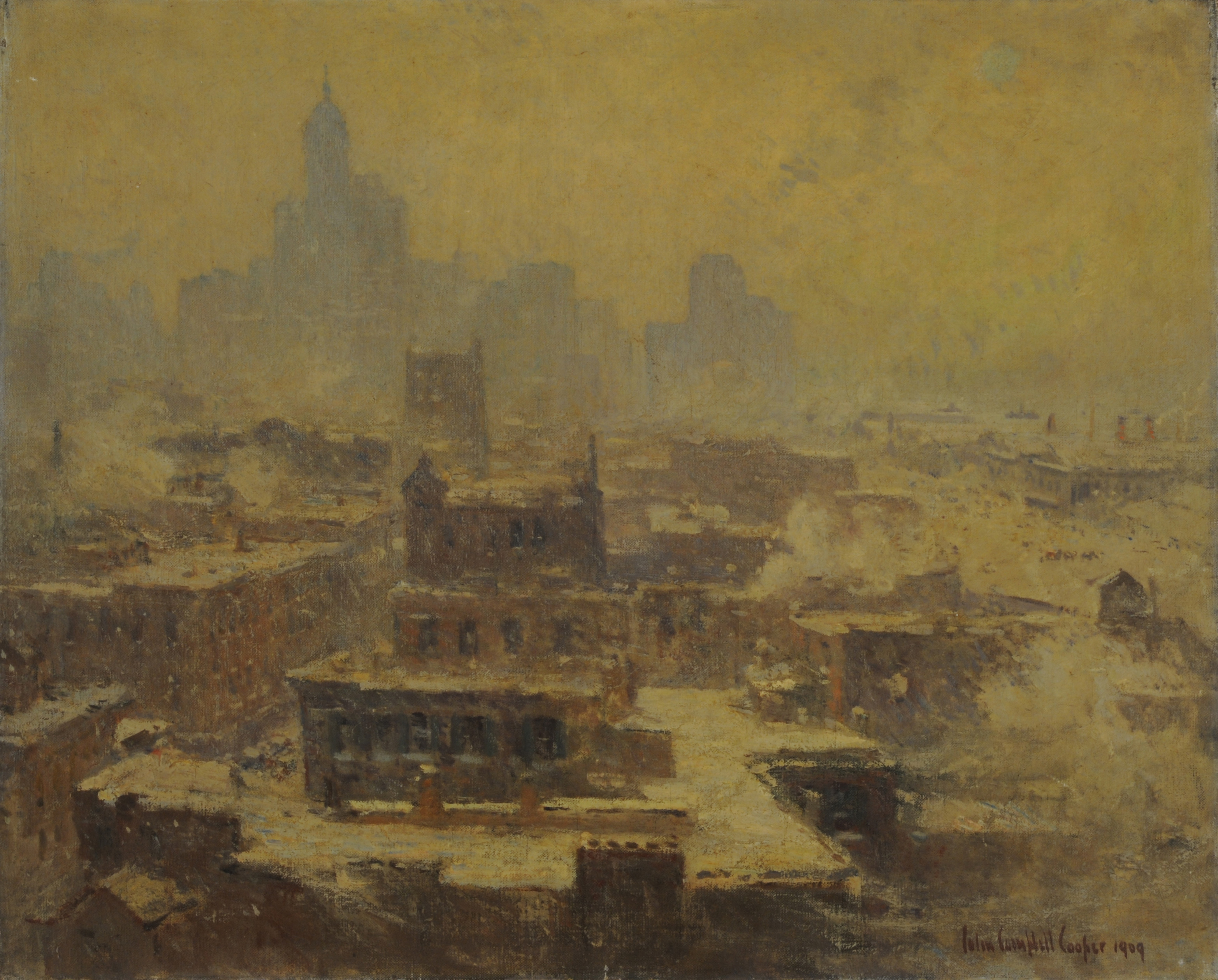 Colin Campbell Cooper, Tormenta de nieve en Nueva York. 1909. 66 x 82 cm, óleo sobre tela. Inv. 2530.